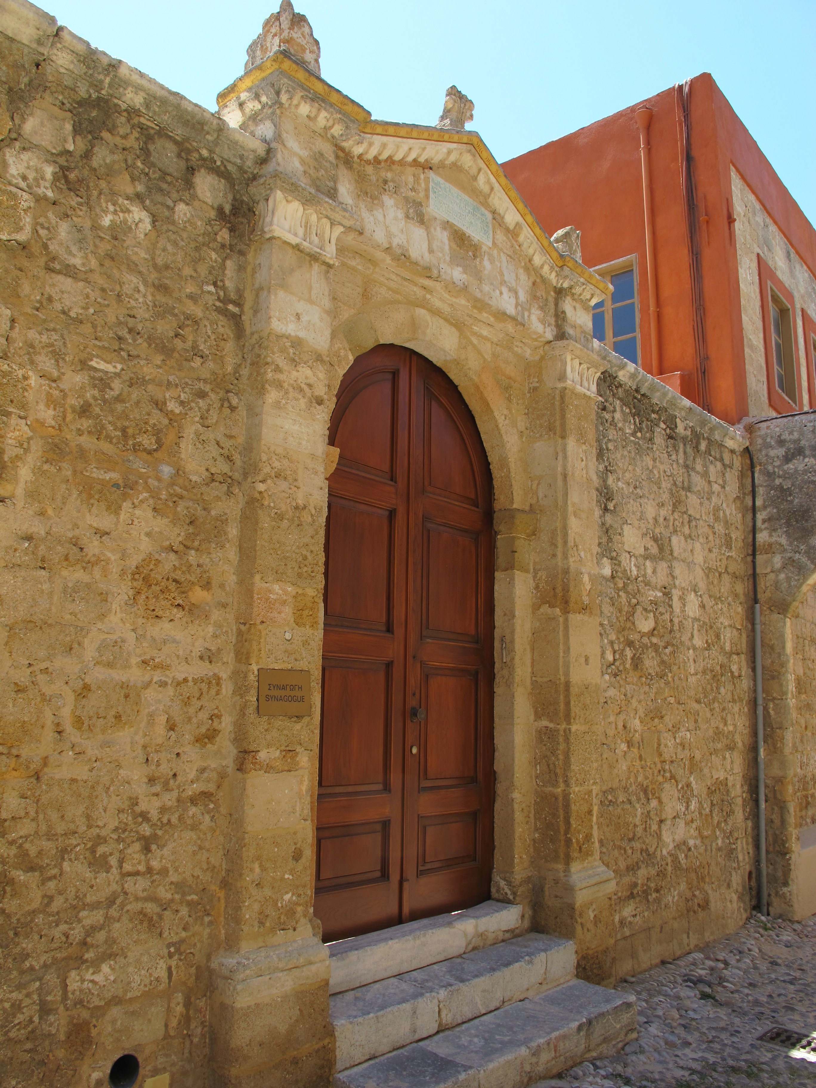 Rosi, Kahal Shalom Synagogue